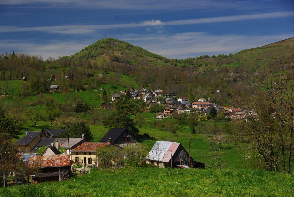 Bléchin, hameau de Seix ; à l'arrière-plan, Sentenac-d'Oust.